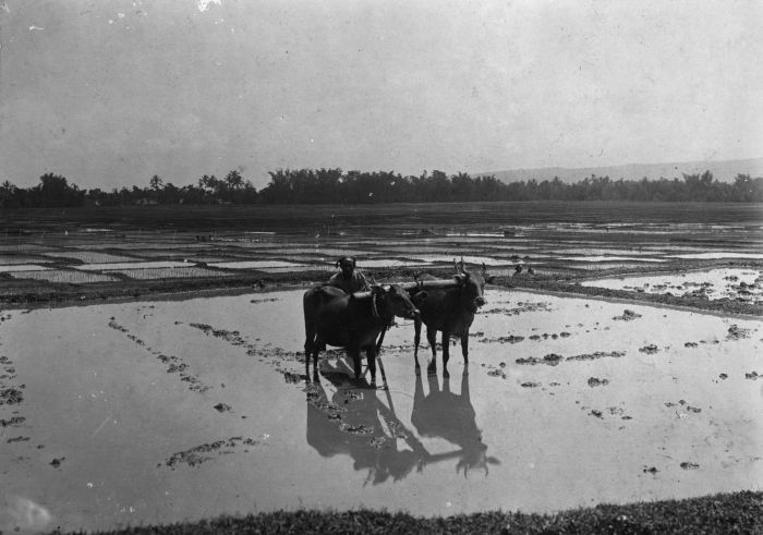 Foto. Het ploegen van een sawa met een span runderen bij Wagir